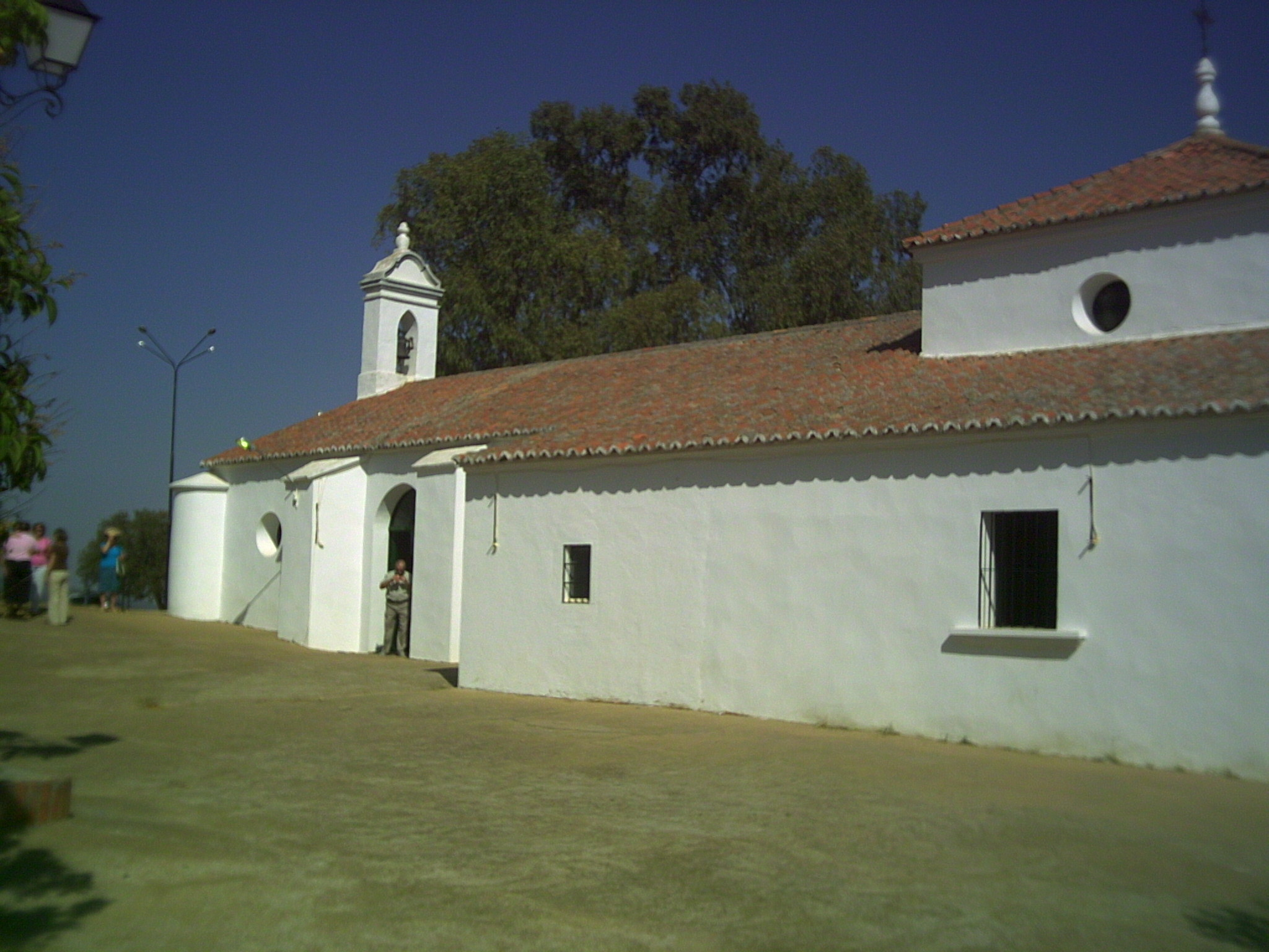 Fachada lateral de la Ermita de Ntra Sra de la ANtigua, Patrona de Hinojosa del Duque (Córdoba)